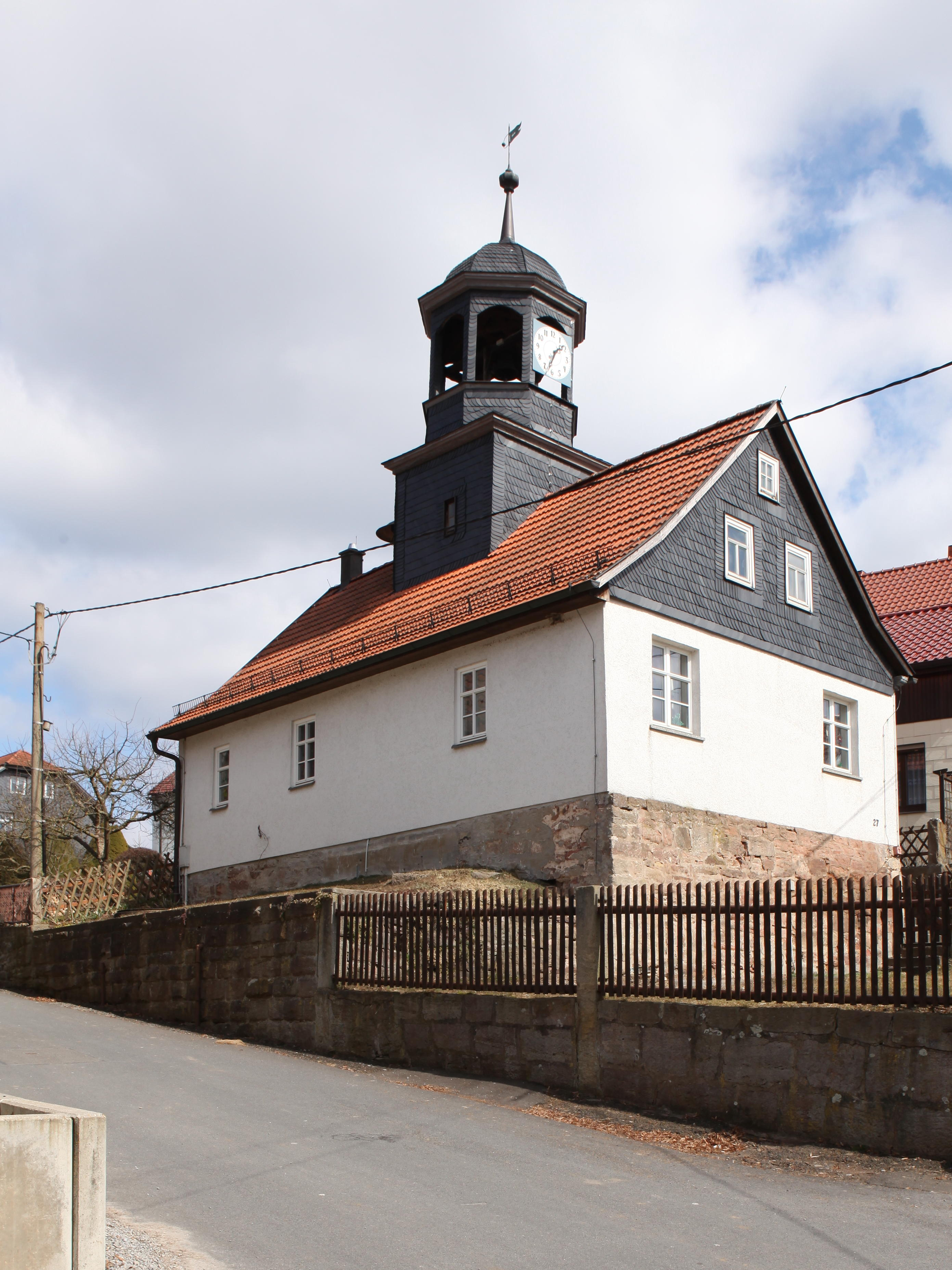 Alte Schule in Grimmelshausen, Landkreis Hildburghausen